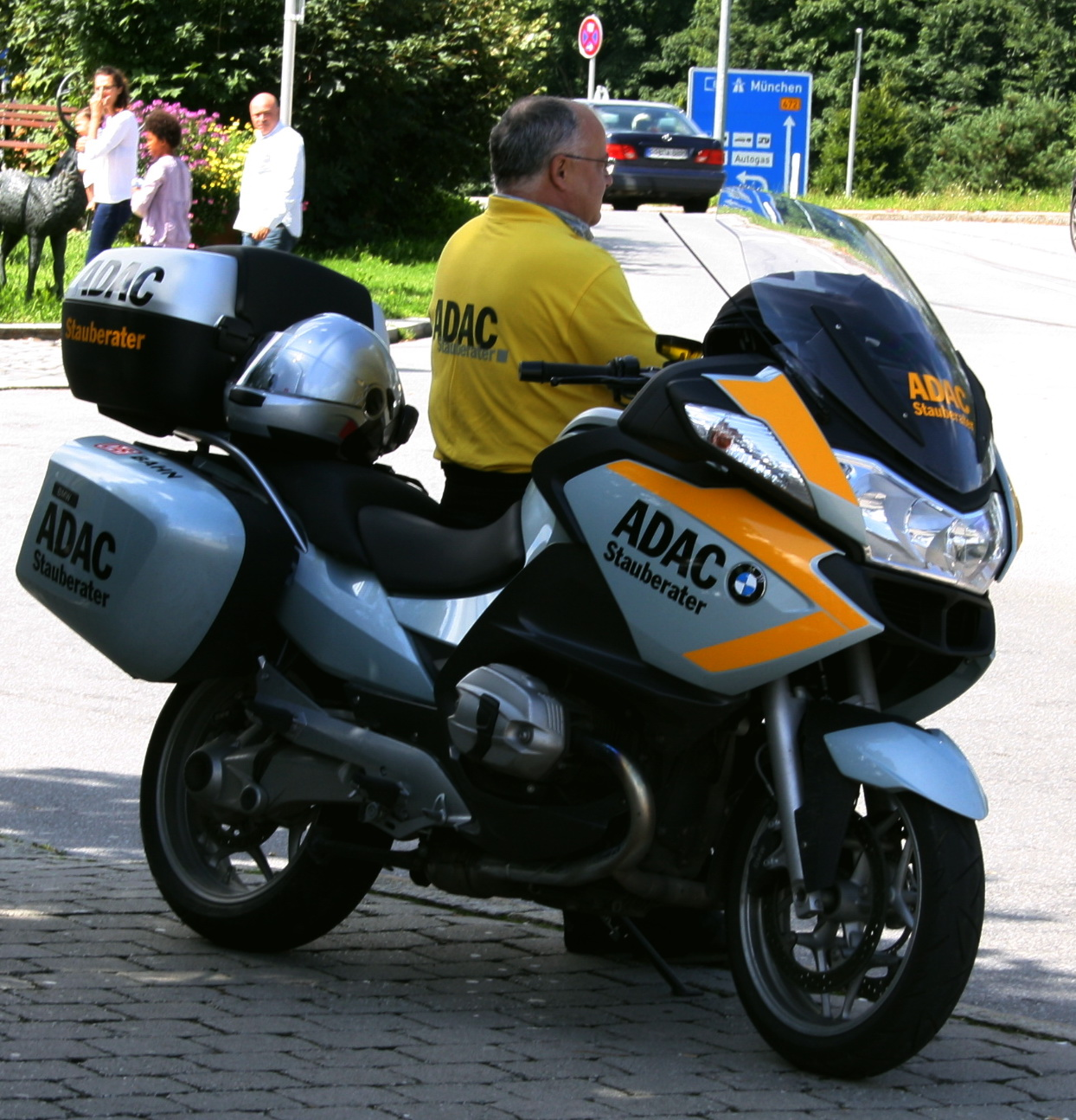 Stauberater des ADAC mit BMW Motorrad an der Raststätte Irschenberg an der A8.